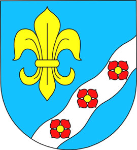 znak obce Bezdědovice